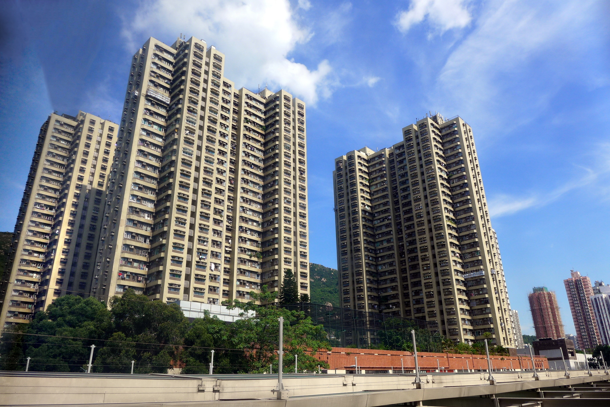 Waldorf Garden